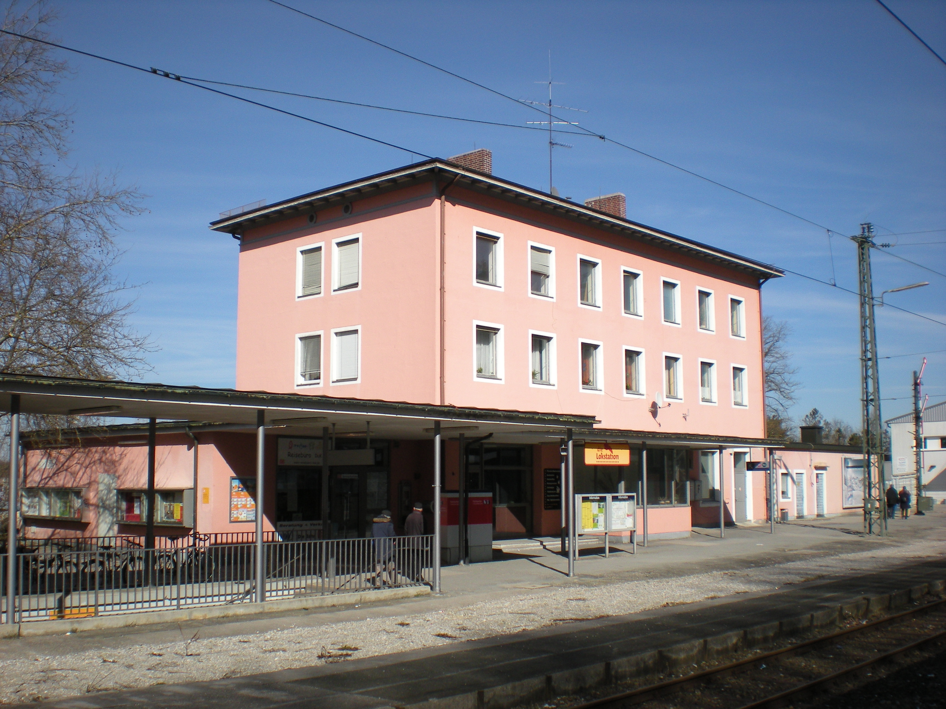 Empfangsgebäude des Bahnhofs Fürstenfeldbruck von der Gleisseite